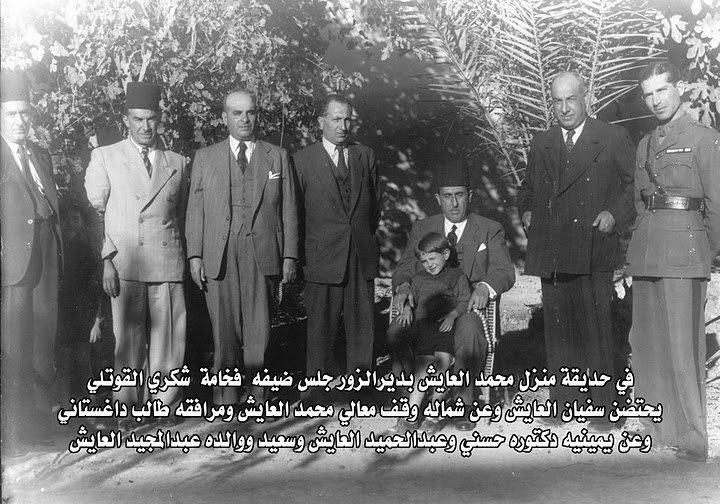 السيد الرئيس شكري القوتلي في ضيافة معالي وزير الاقتصاد محمد بك العايش في منزله في دير الزور